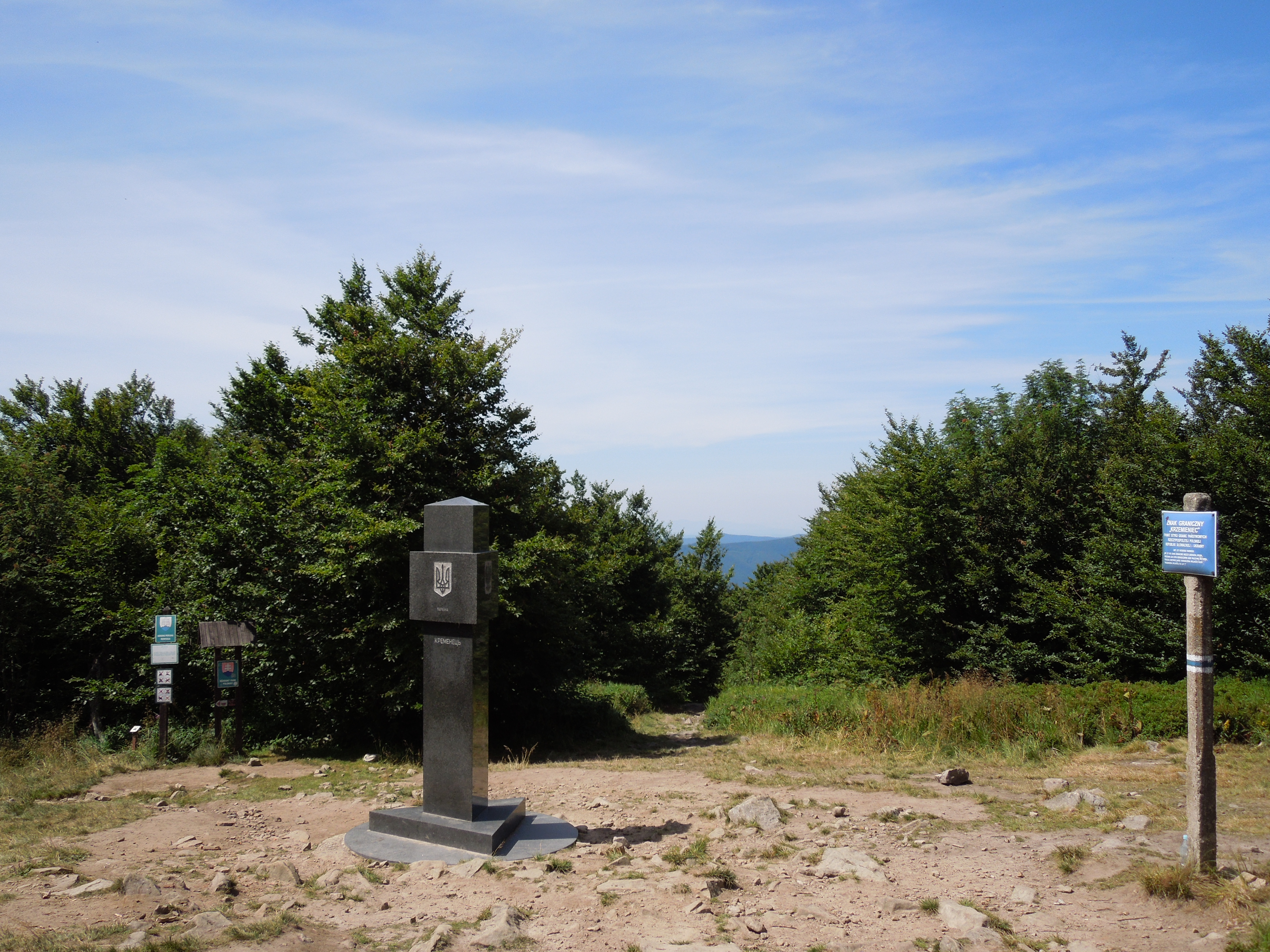 Trojhraničný (SK/PL/UA) stĺp na vrchu Kremenec, najvýchodnejší bod Slovenska (miesto: Bukovské vrchy, Národný park Poloniny) This is a photography of Natura 2000 protected area with ID SKUEV0229 This is a photography of Natura 2000 protected area with ID SKCHVU002 This is a photography of Natura 2000 protected area with ID PLC180001